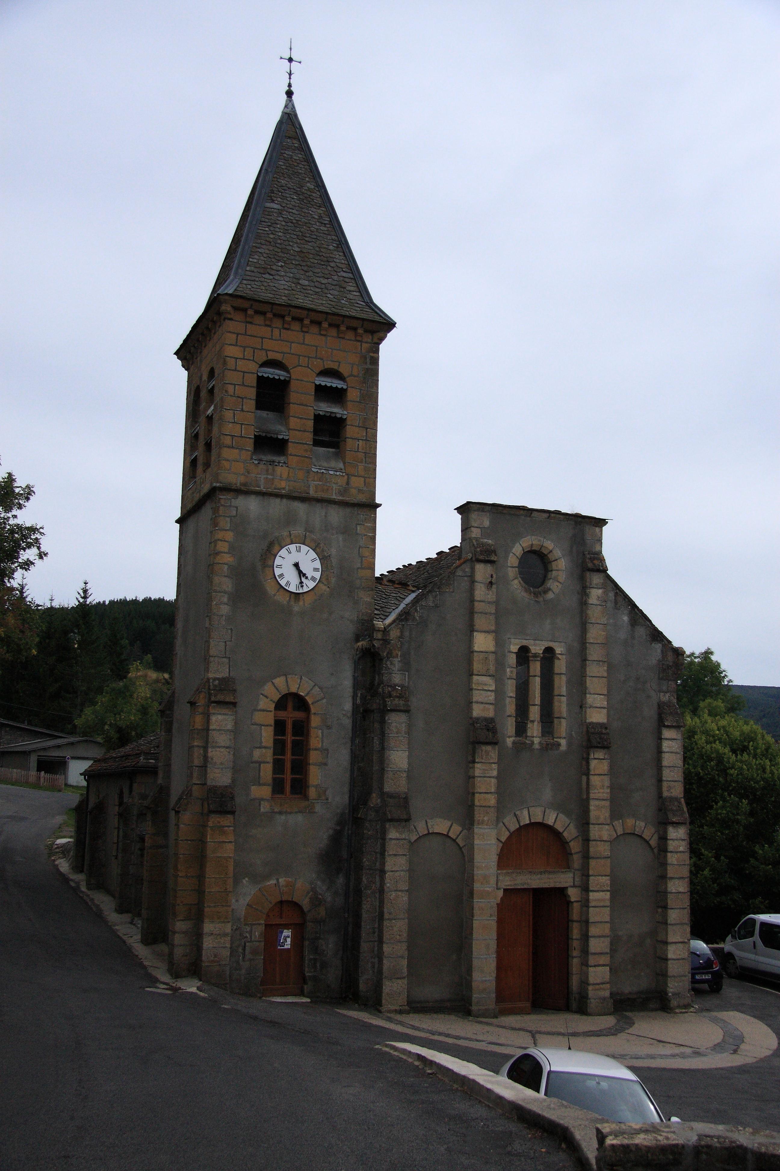 Église Saint-Jean-Baptiste sur la commune du Bleymard en Lozère